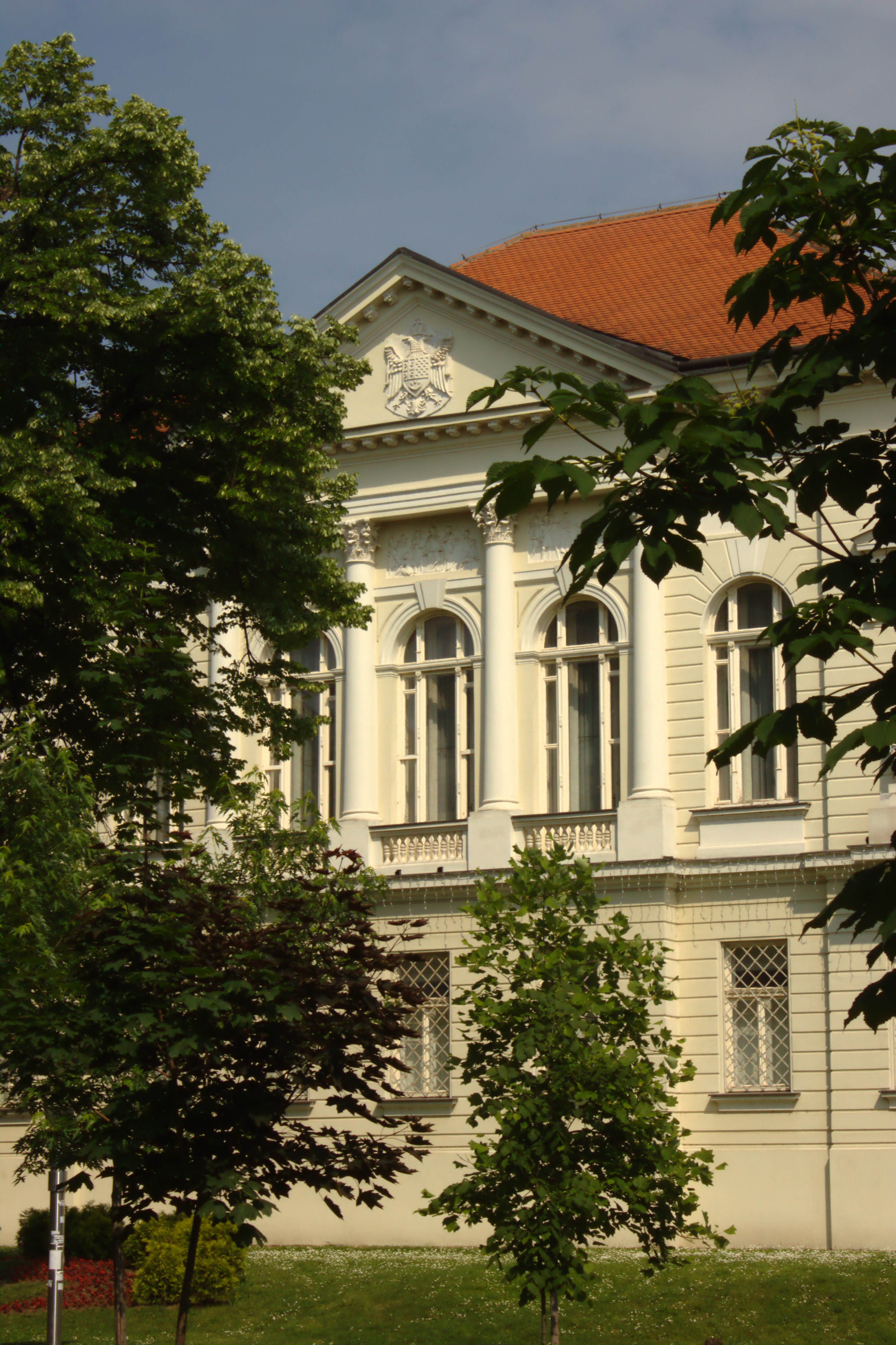 Muzej u Sremskoj Mitrovici.